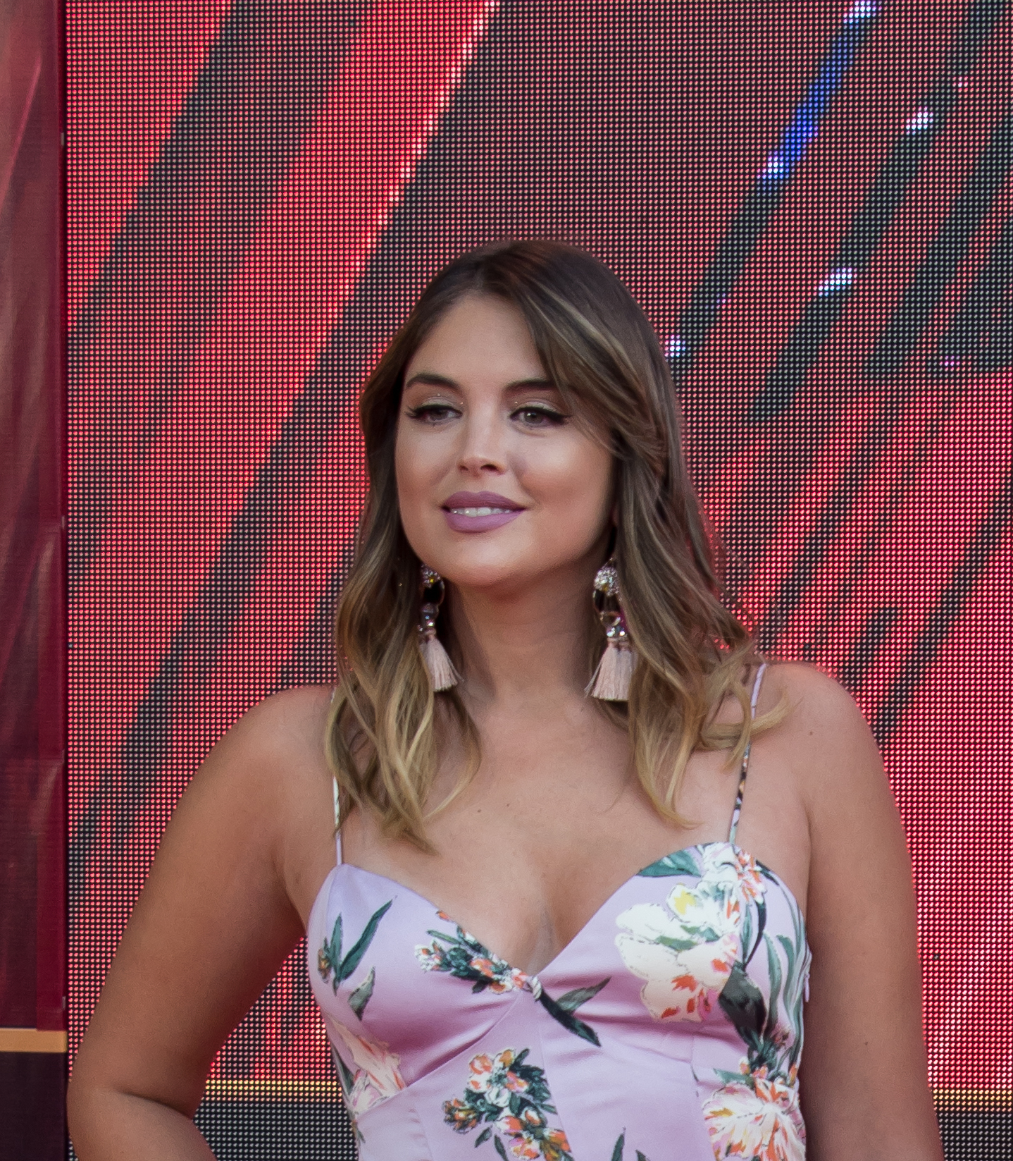 Constanza Piccoli y Romina Piccoli, Copihue de Oro 2018, Sun Monticello, Mostazal, Región de O'Higgins, Chile